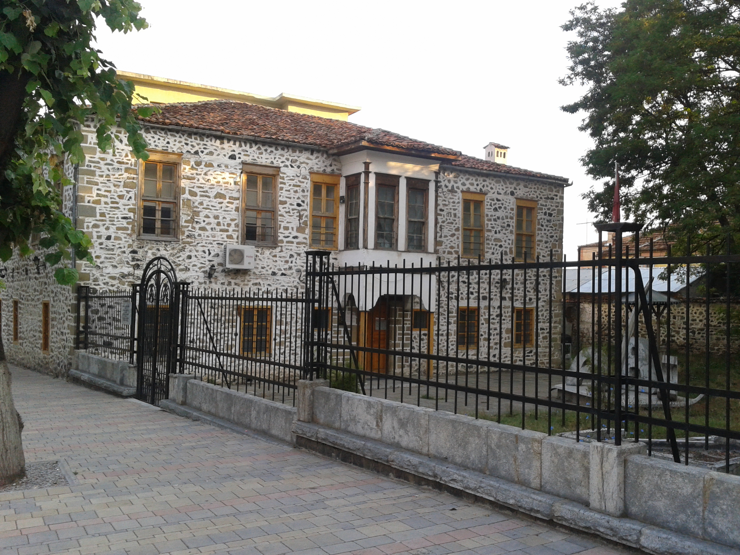 Mesonjetorja e Pare Shqipe